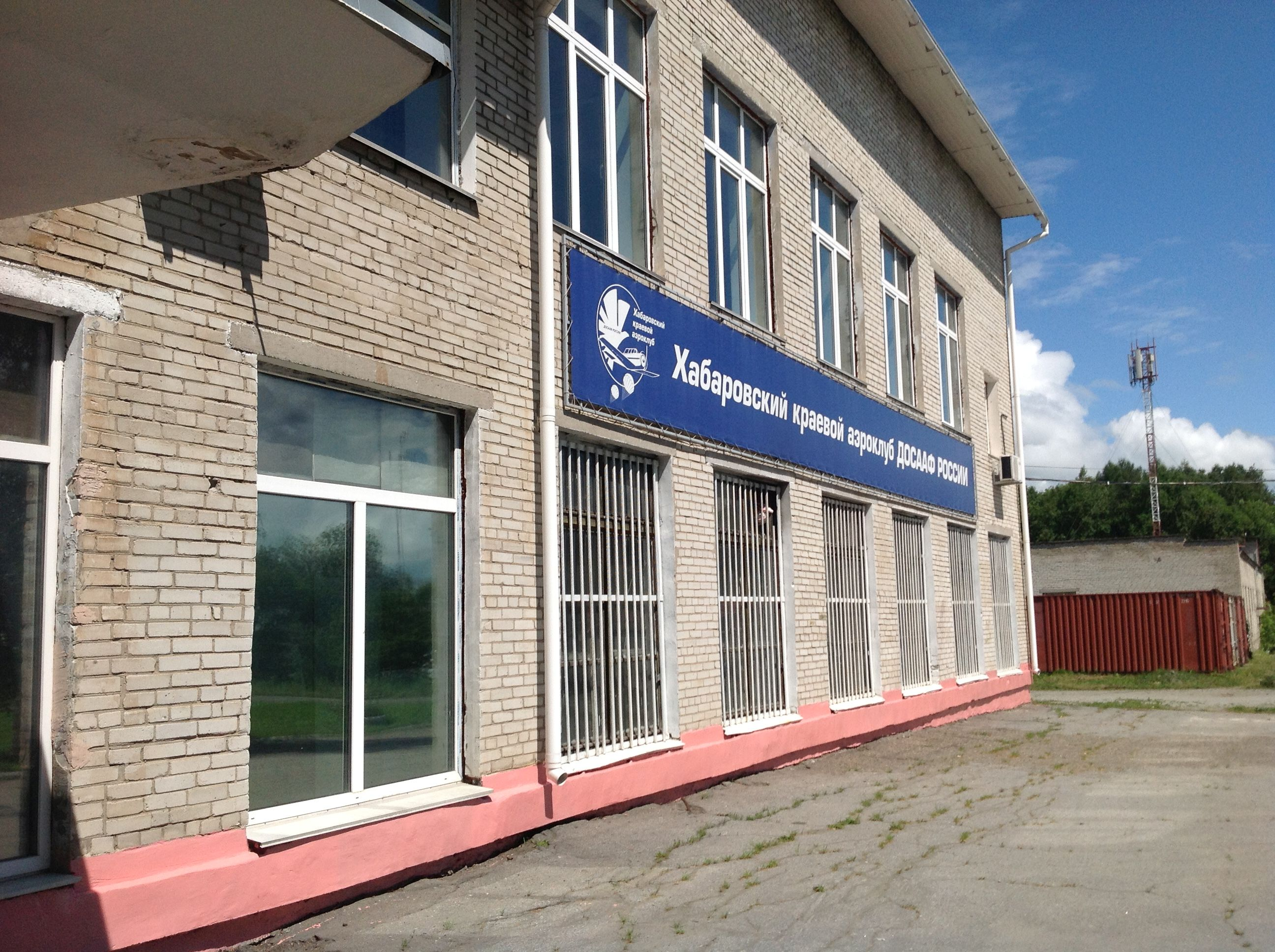 Здание аэроклуба Хабаровска